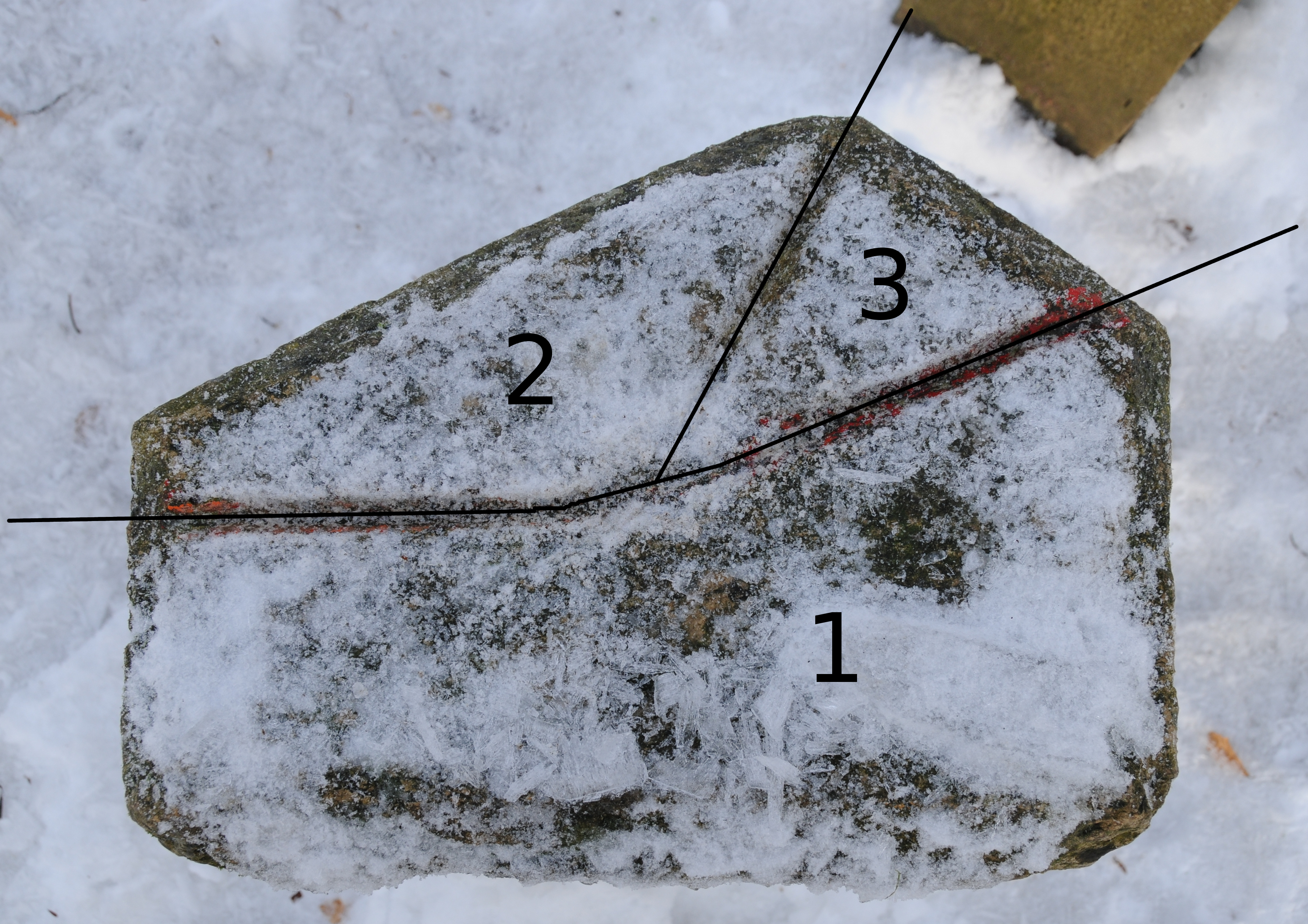 This photograph was taken with a Nikon D300 Site de la borne des Trois Puissances. Détail du dessus de la borne des Trois puissances : 1 : Suisse 2 : France (entre 1871 et 1914) 3 : Allemagne (entre 1871 et 1914)